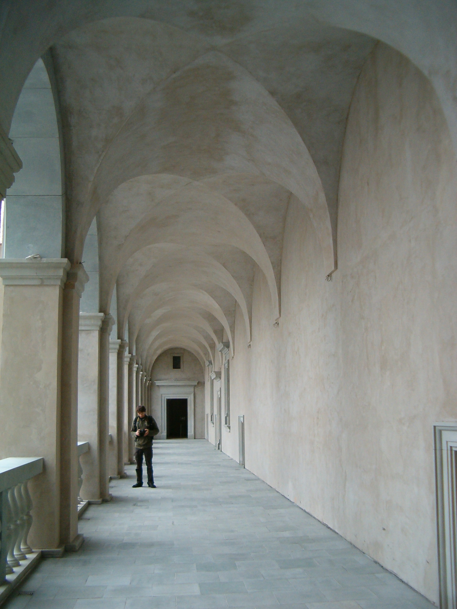 Zamek Dolny w Wilnie - Loggia